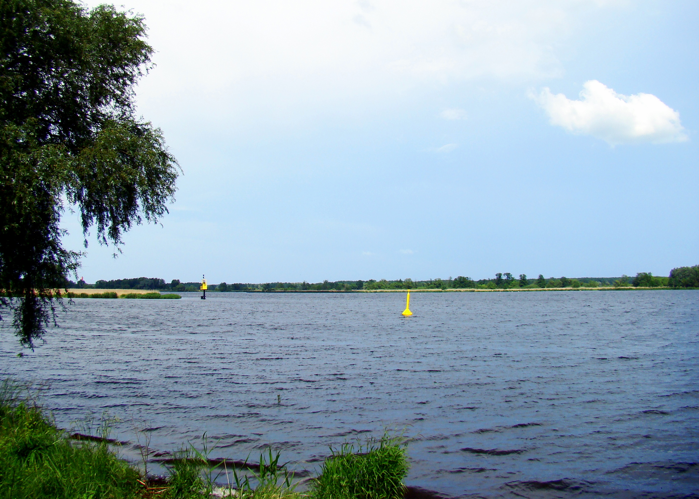 Odra-Domiąża, Województwo zachodniopomorskie, Polska